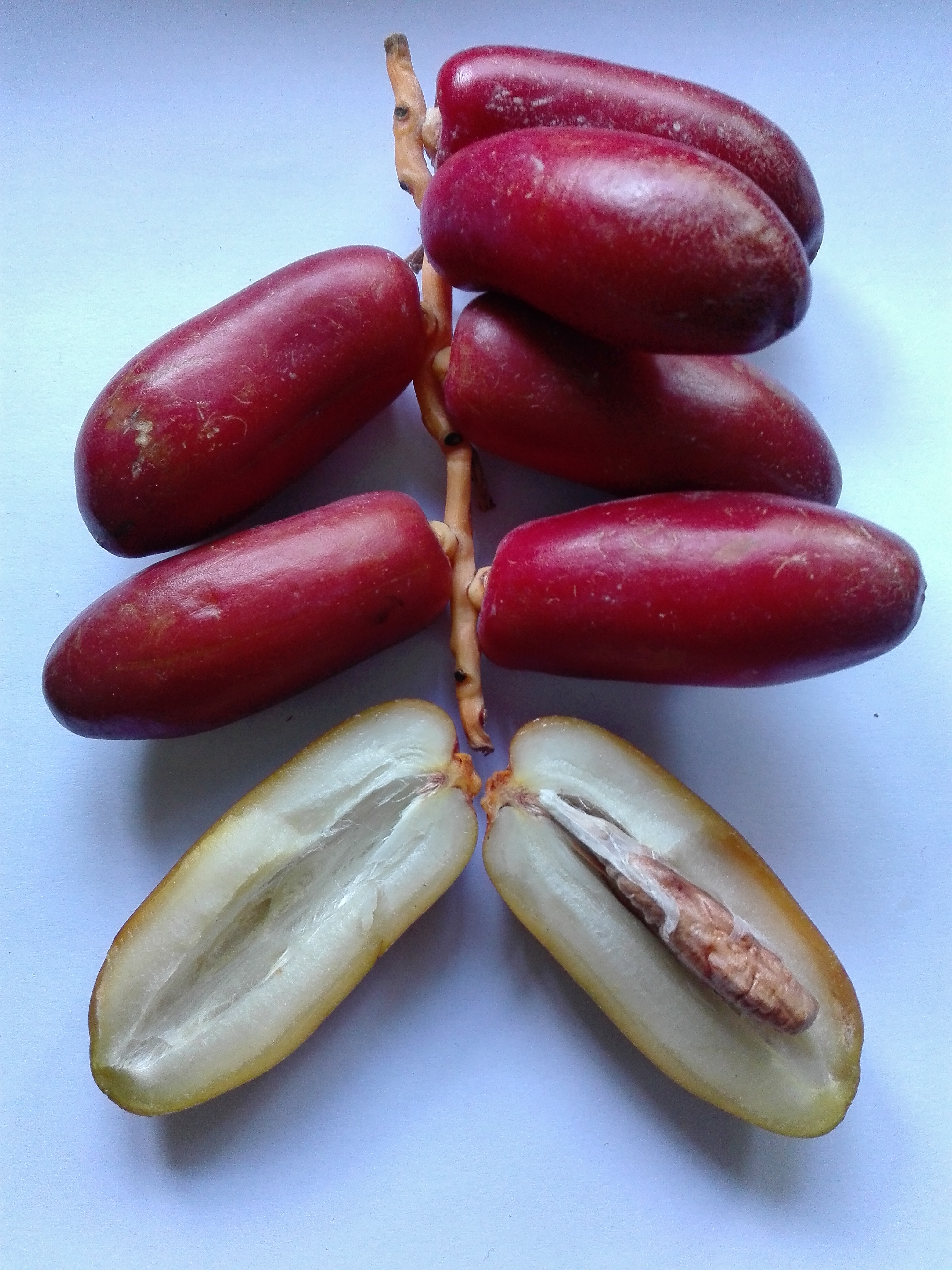 Kurma muda Segar memiliki warna merah, kuning dan hijau. Rasa kurma muda manis dan sedikit sepat dengan postur yang keras